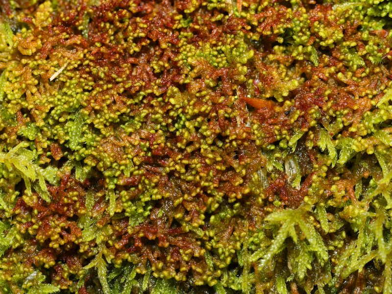 Schönes Federchenmoos (Ptilidium pulcherrimum)